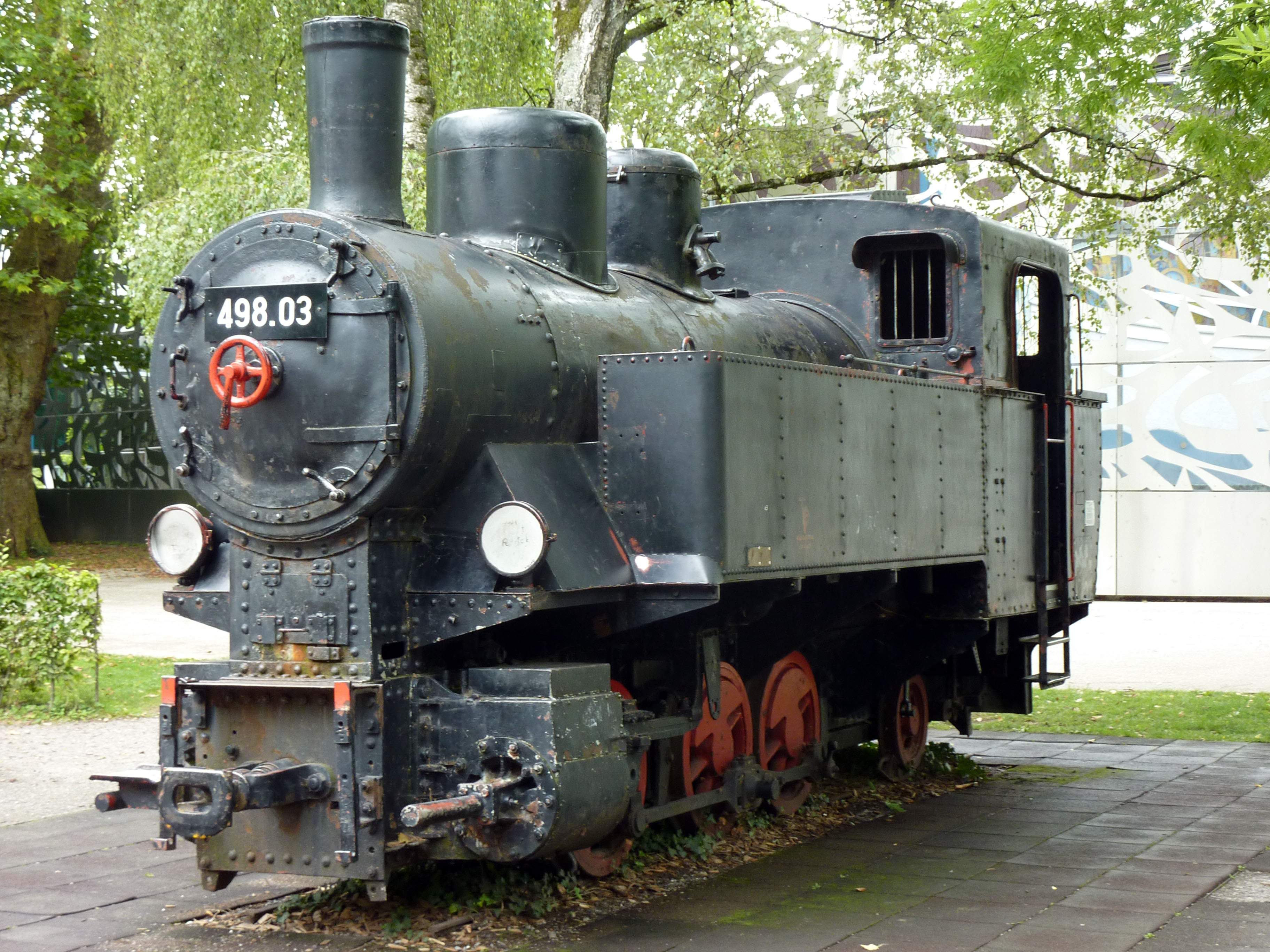 Schmalspurtenderlok 498.03 der ÖBB als Denkmal in Bregenz.